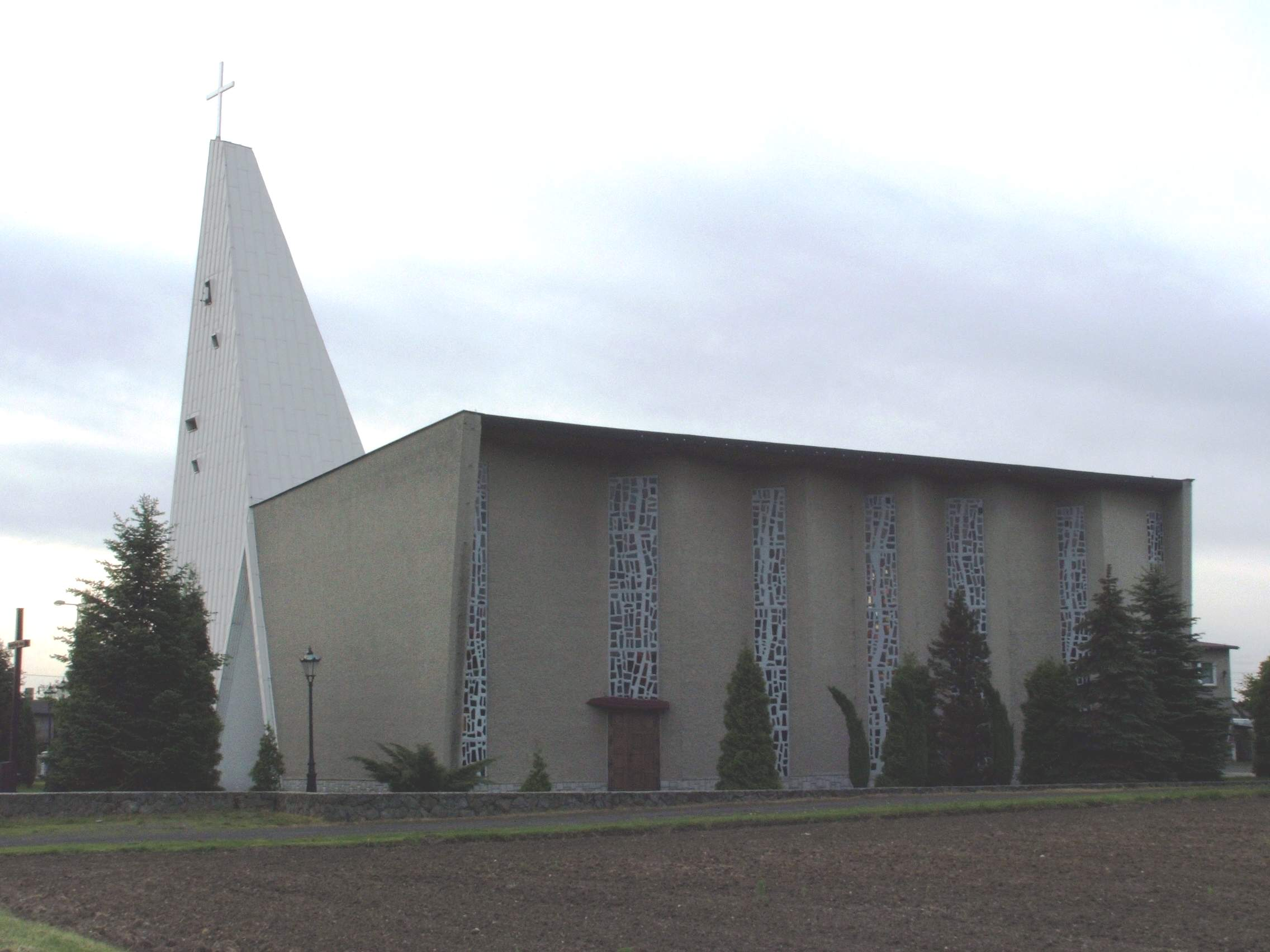 Kościół Podwyższenia Krzyża św. w Żorach-Roju, praca własna 2006.